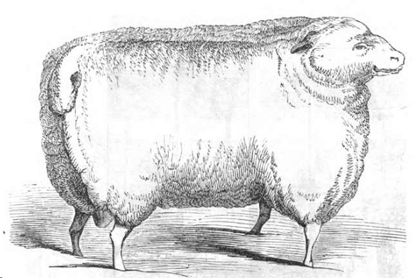 Leicester Schur-Widder des Herrn Pawlett, 17 Monate alt, erhielt den ersten Preis von 30 Pfd. Sterl.